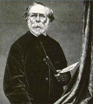 Paul Huet